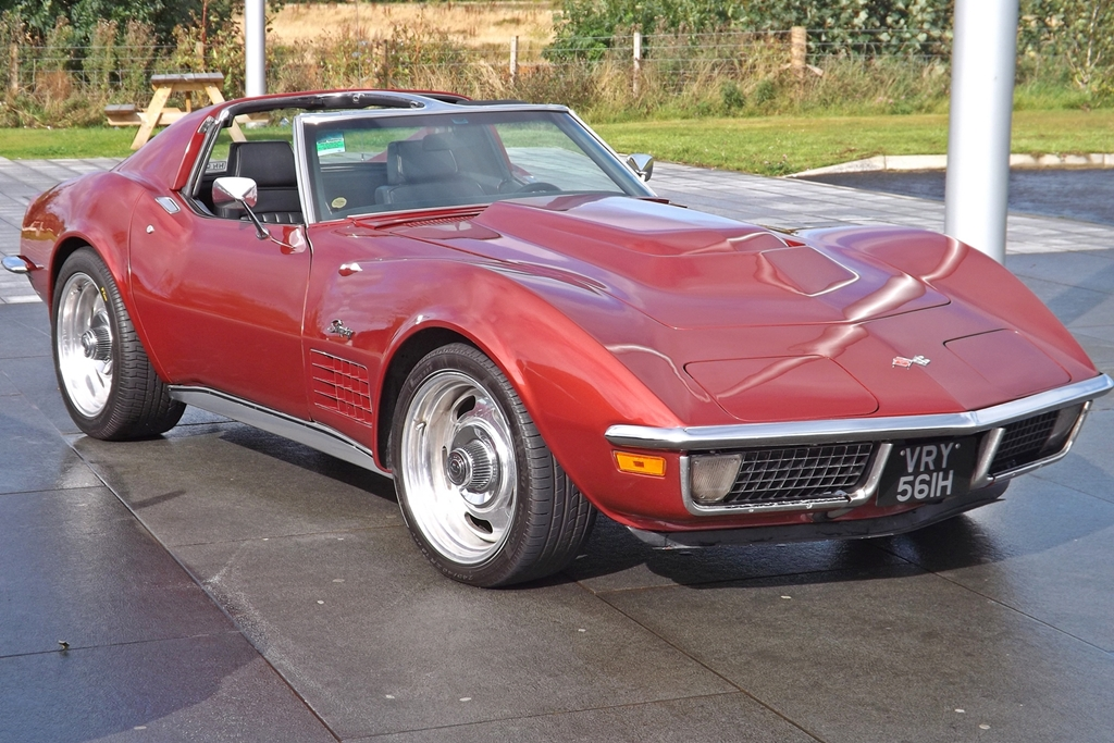 Corvette Stingray